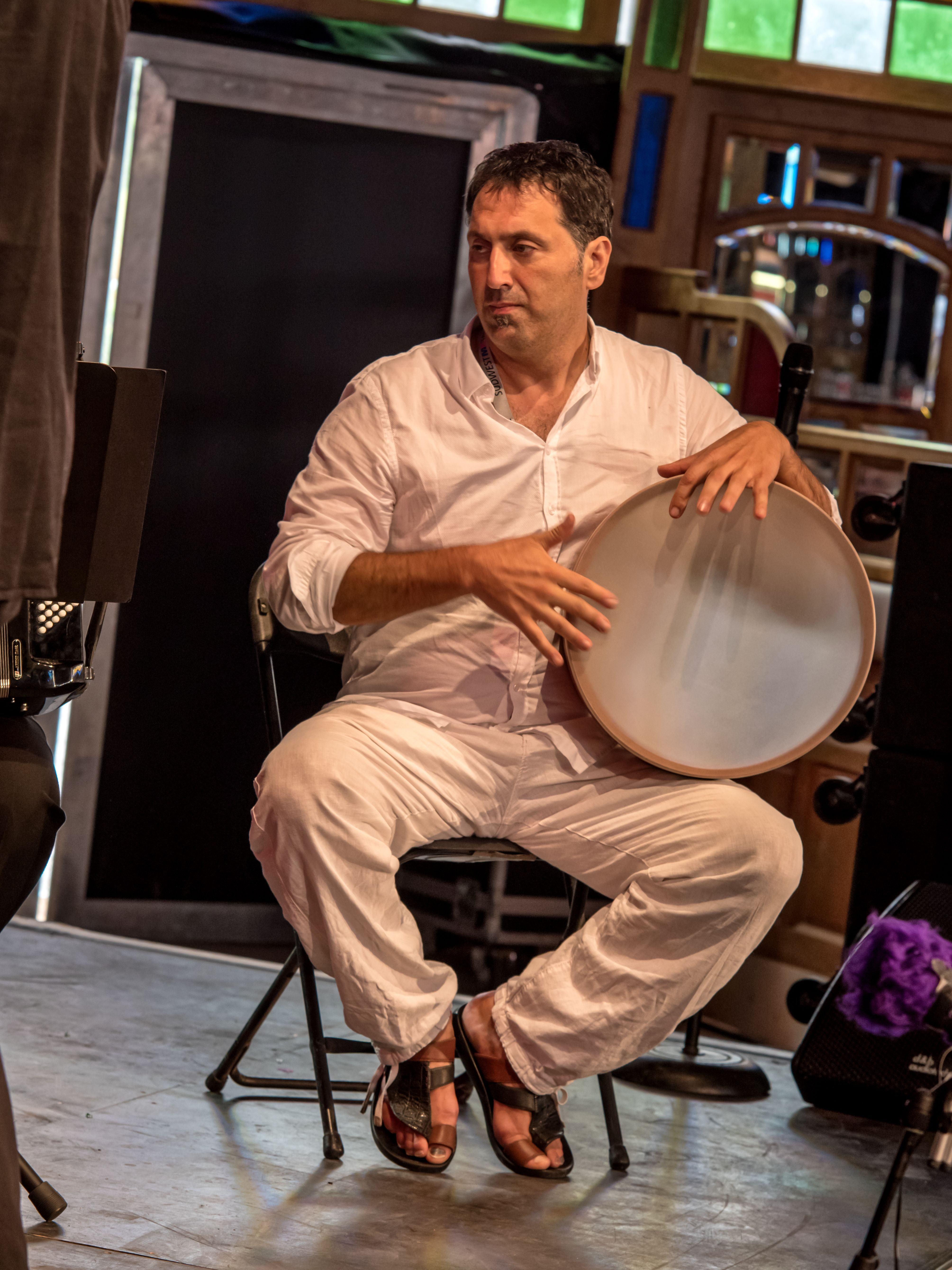 Bilder vom Zelt Musik Festival 2016 in Freiburg im Breisgau Die Sonntagsmatinee "Klassik bis Tango"